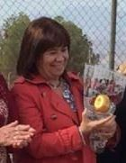 Cristina Narbona, ex Ministra de Medio Ambiente recoge su Pimentón de Oro